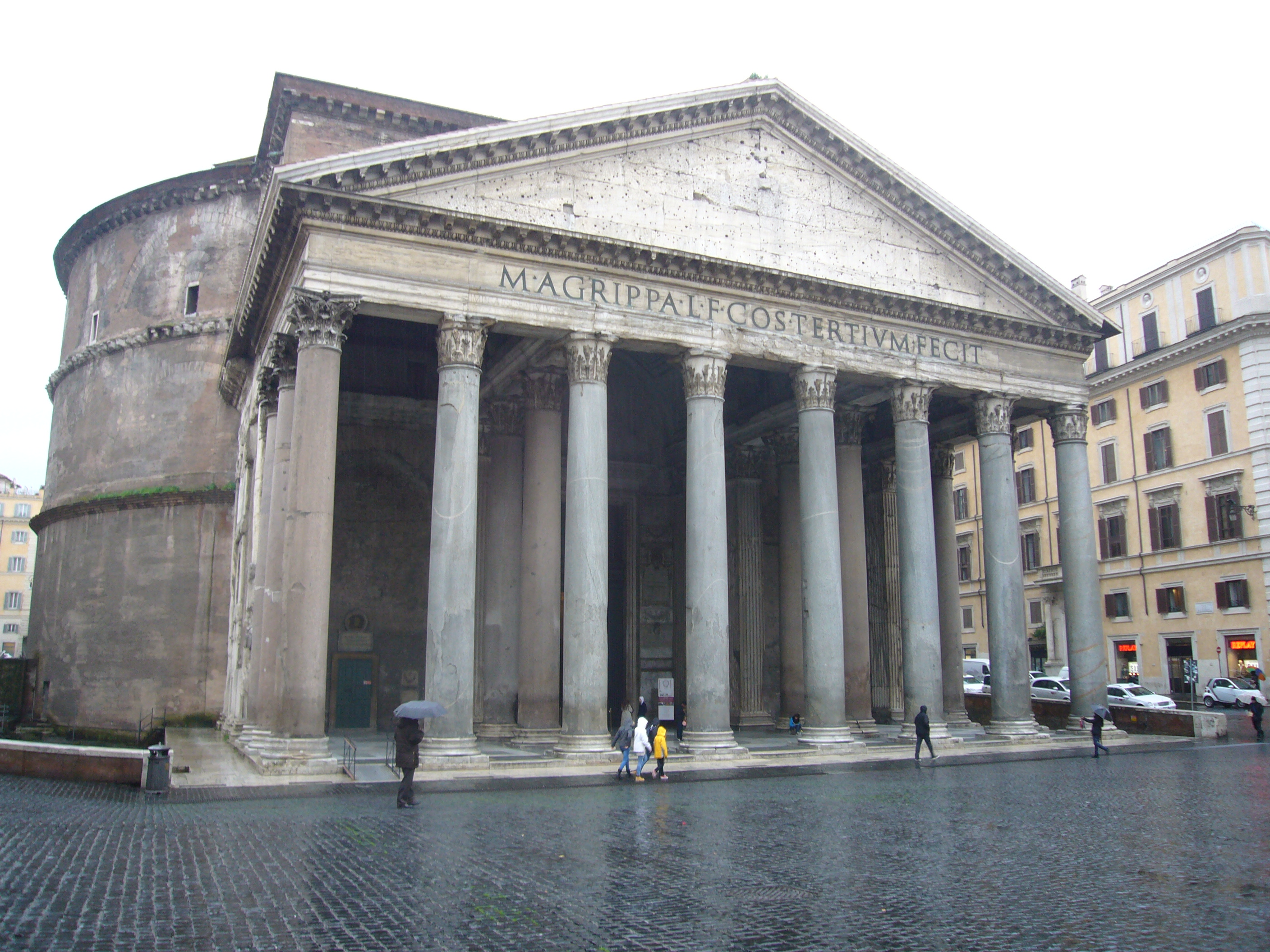 Roma, Pantheon. Momentanea tregua turistica a piazza della Rotonda.